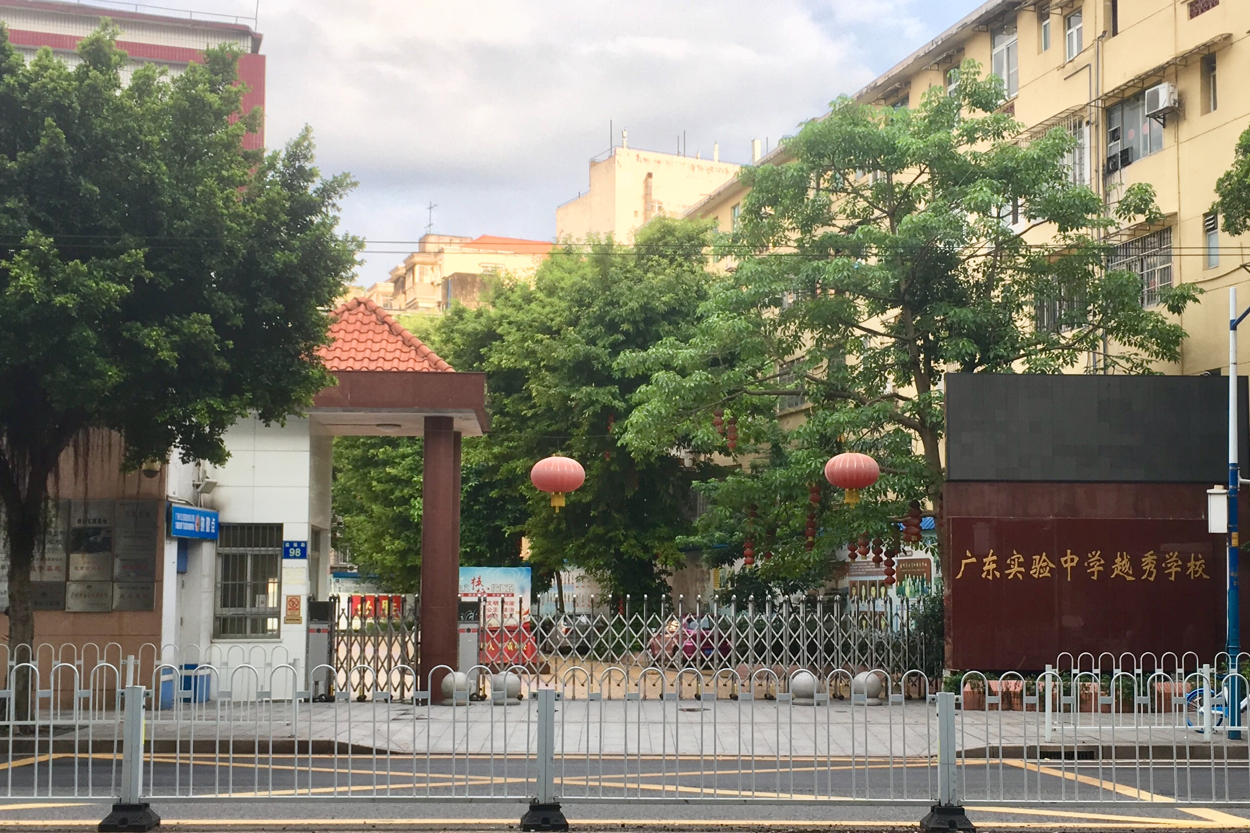 中文（香港）: 广东实验中学越秀学校初中部